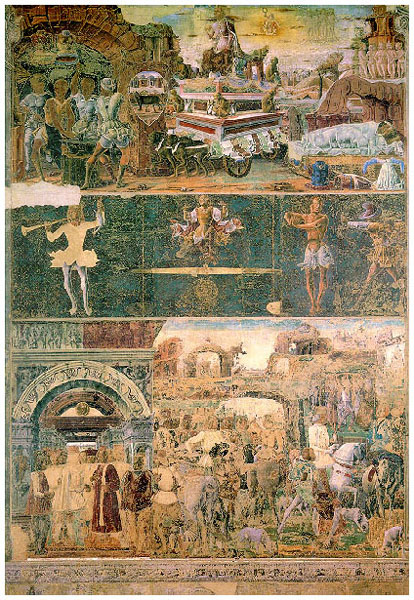 Il mese di Settembre a Schifanoia, ca. 1470